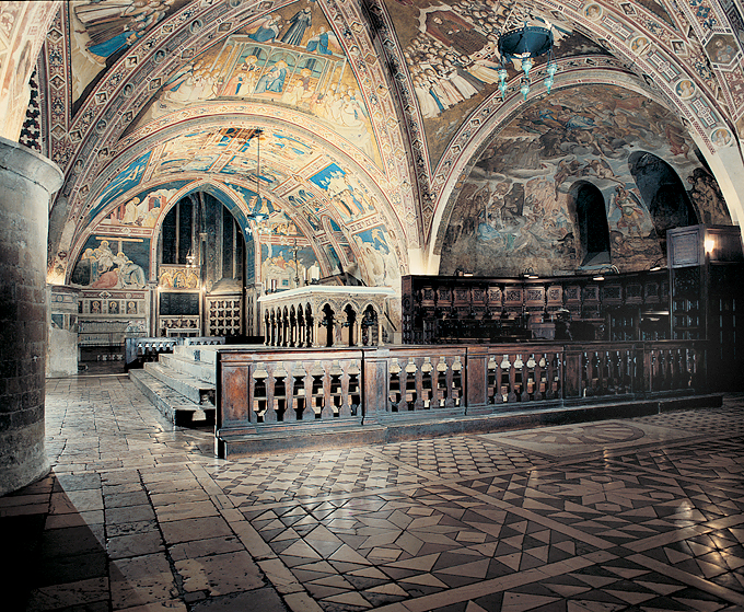 L'altare maggiore della Basilica inferiore di San Francesco (Assisi - Italy)